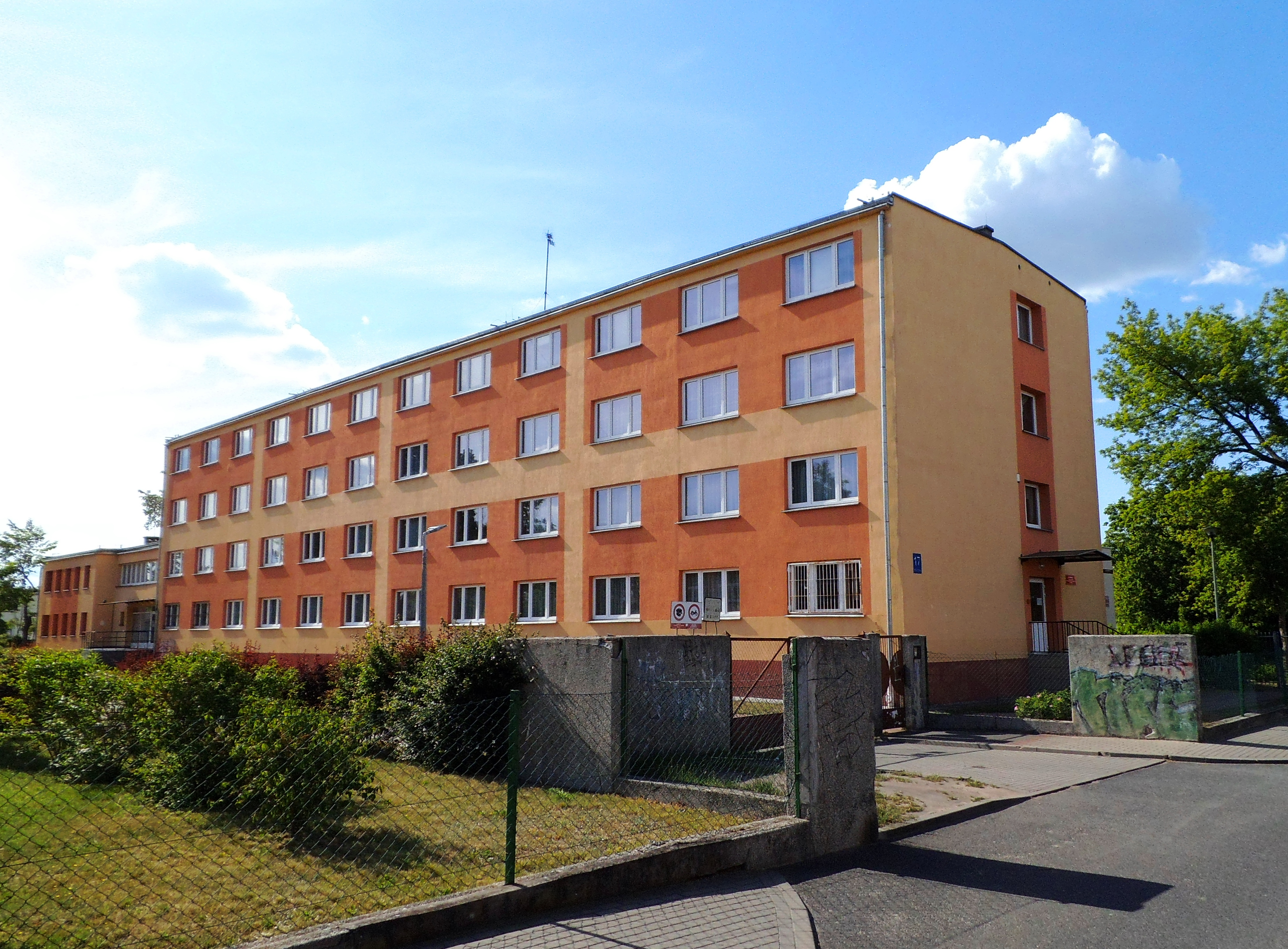 Zespół Szkół Gastronomiczno-Hotelarskich w Toruniu1